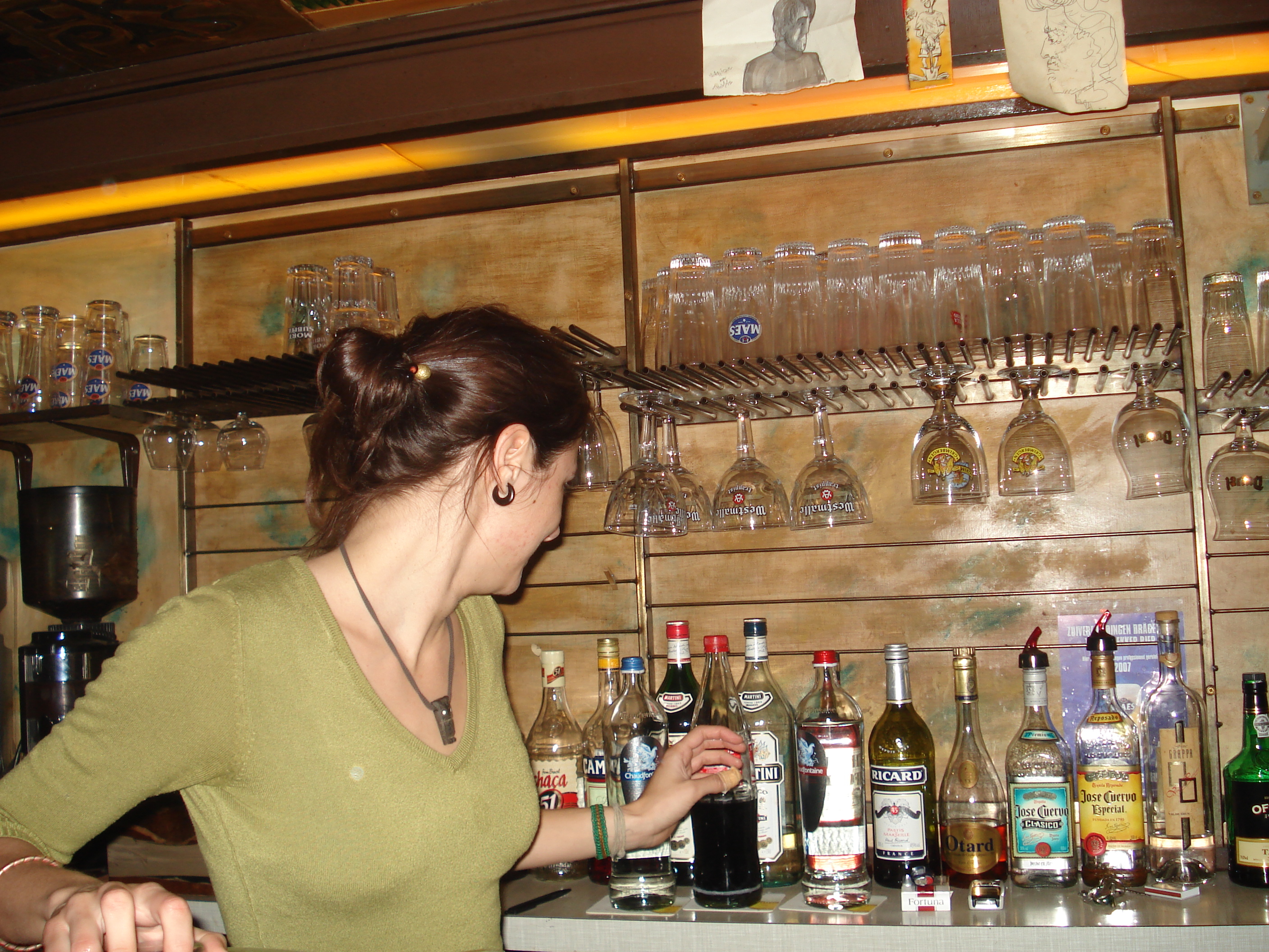 de toog van de Pallieter, Mechelseplein 17, Antwerpen